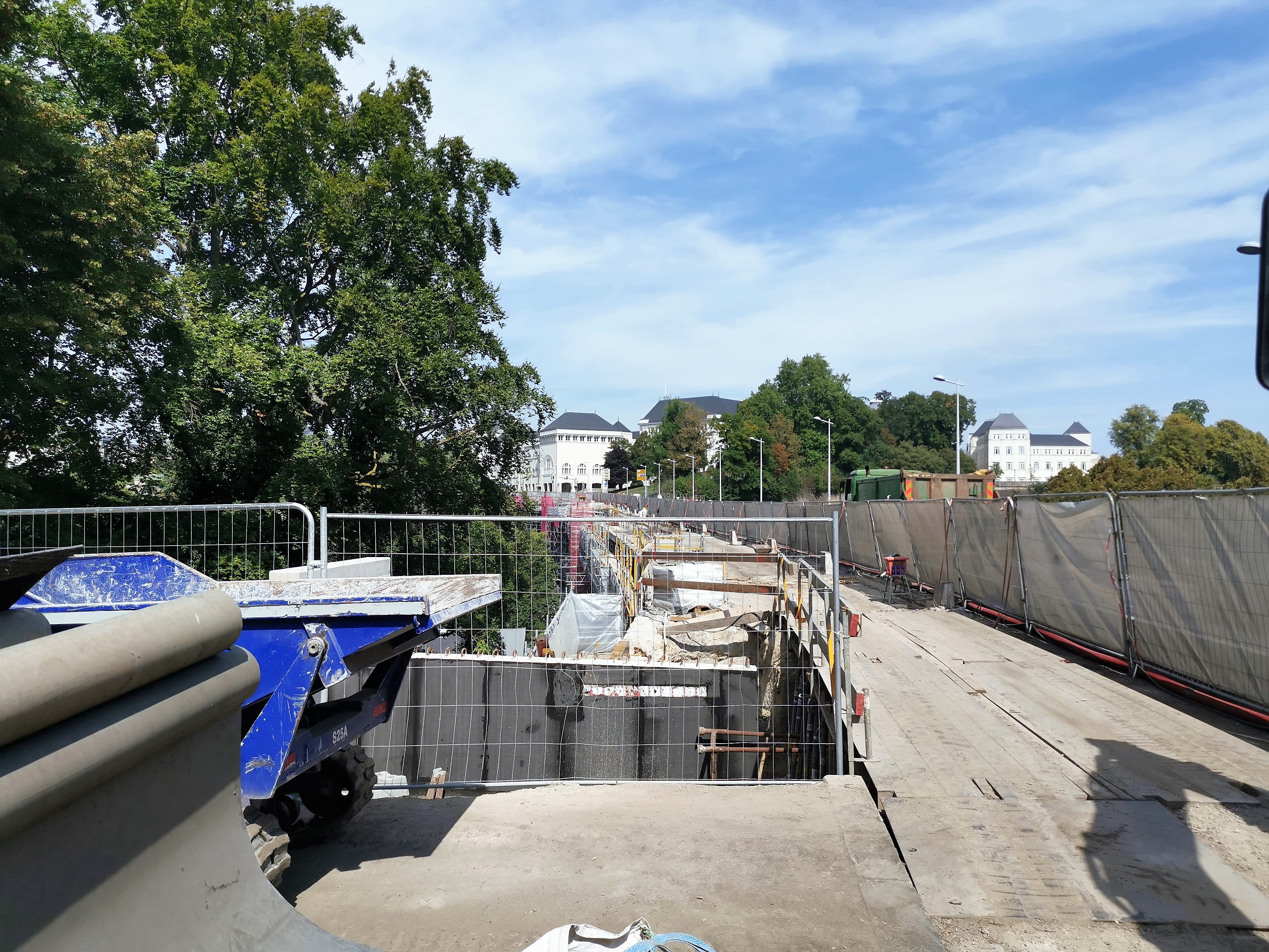 Luxembourg, pont "Viaduc", pendant les travaux d'élargissement.